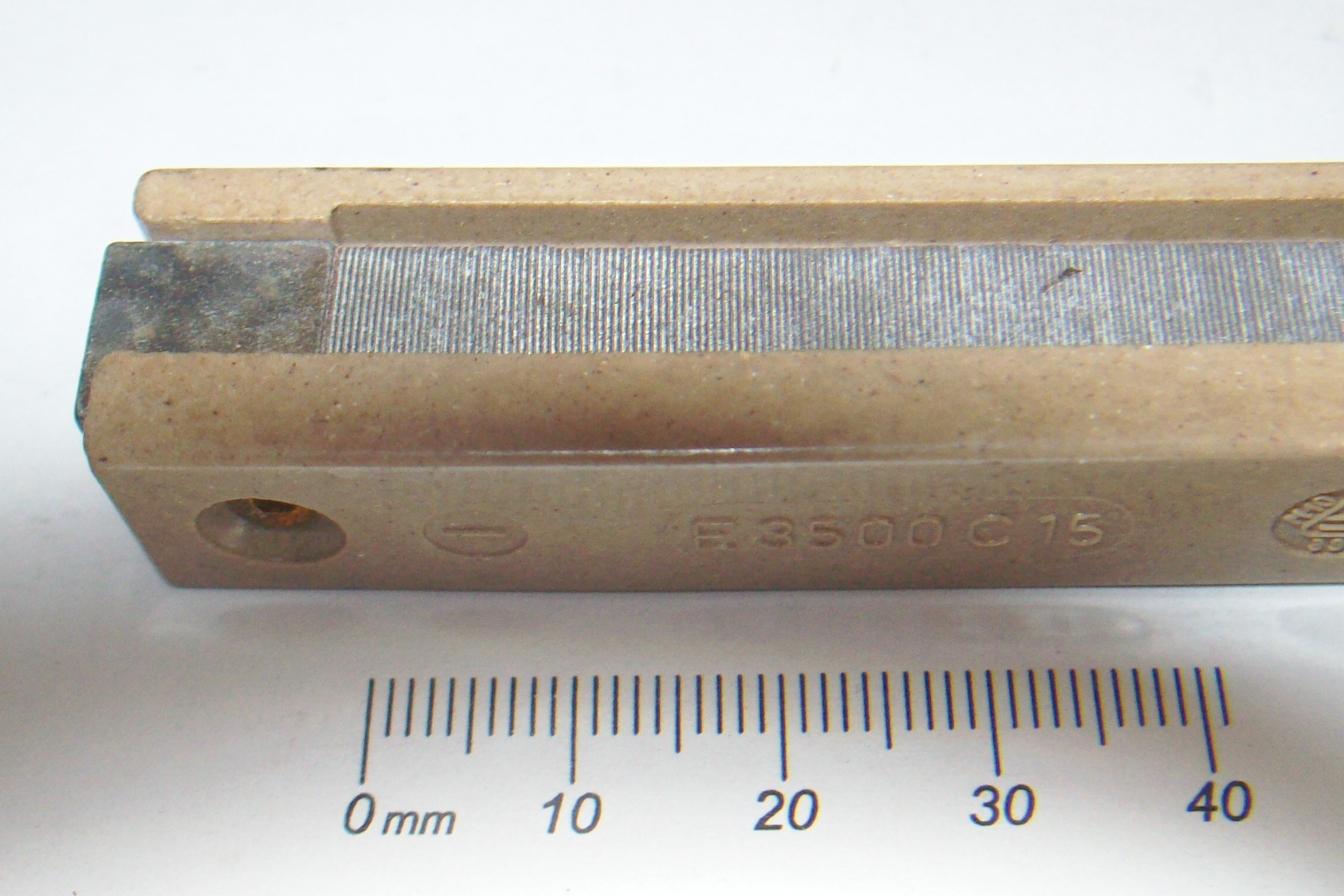 selen rectifier made of hundreds of selen-coated metal sheets. Whole length of the rod is 150 mm. tech. data: 15 mA / 3500 V Selenstab (Gleichrichter) aus hunderten Selendioden (Selen-beschichtete Metallplättchen). Gesamtlänge 150 mm